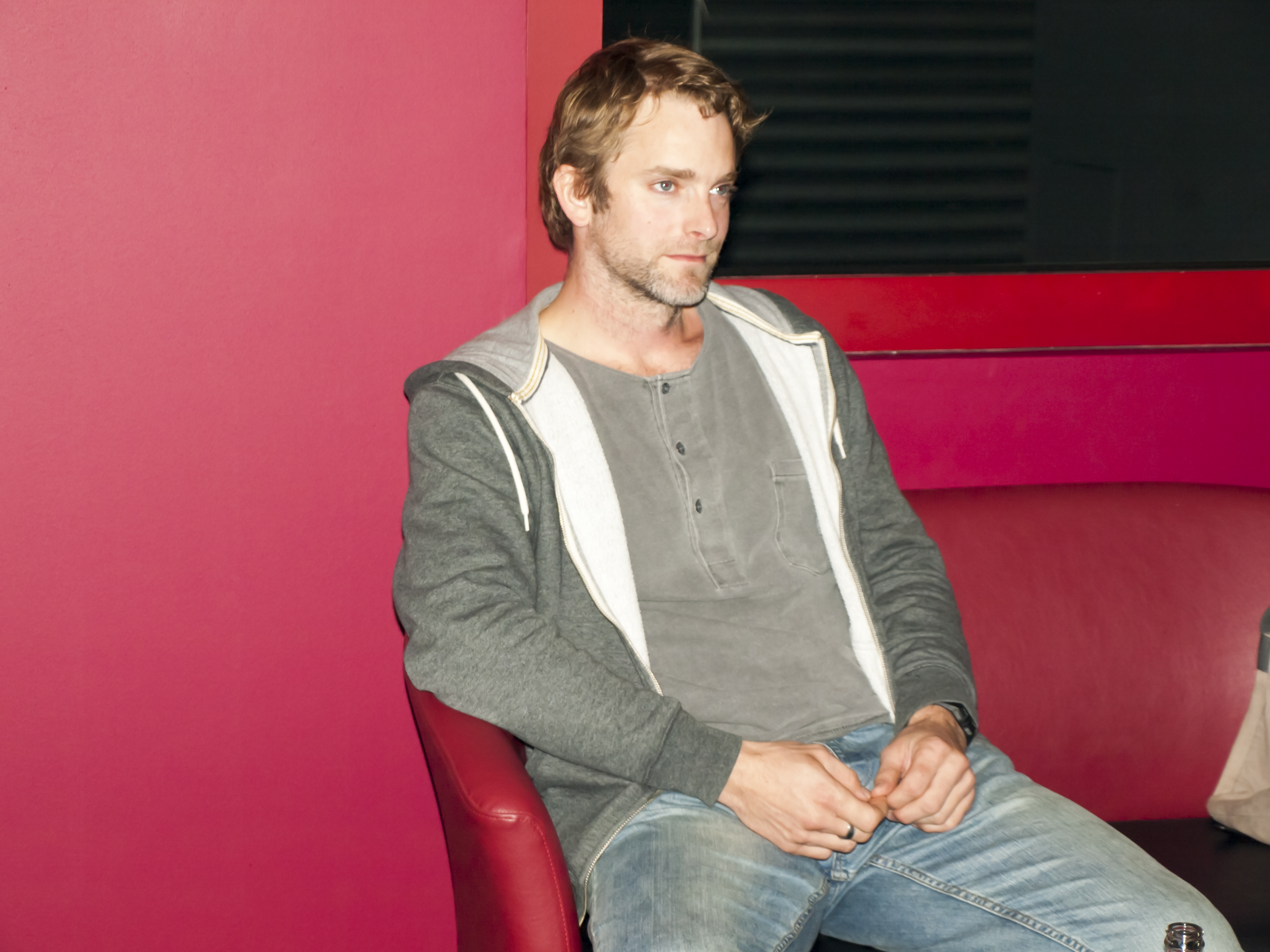 Fotky z novinářské konference 15.9.2015. Autor: Blanka Borová (Karolína Černá) pro Kritiky.cz & [ 10Mpix.cz